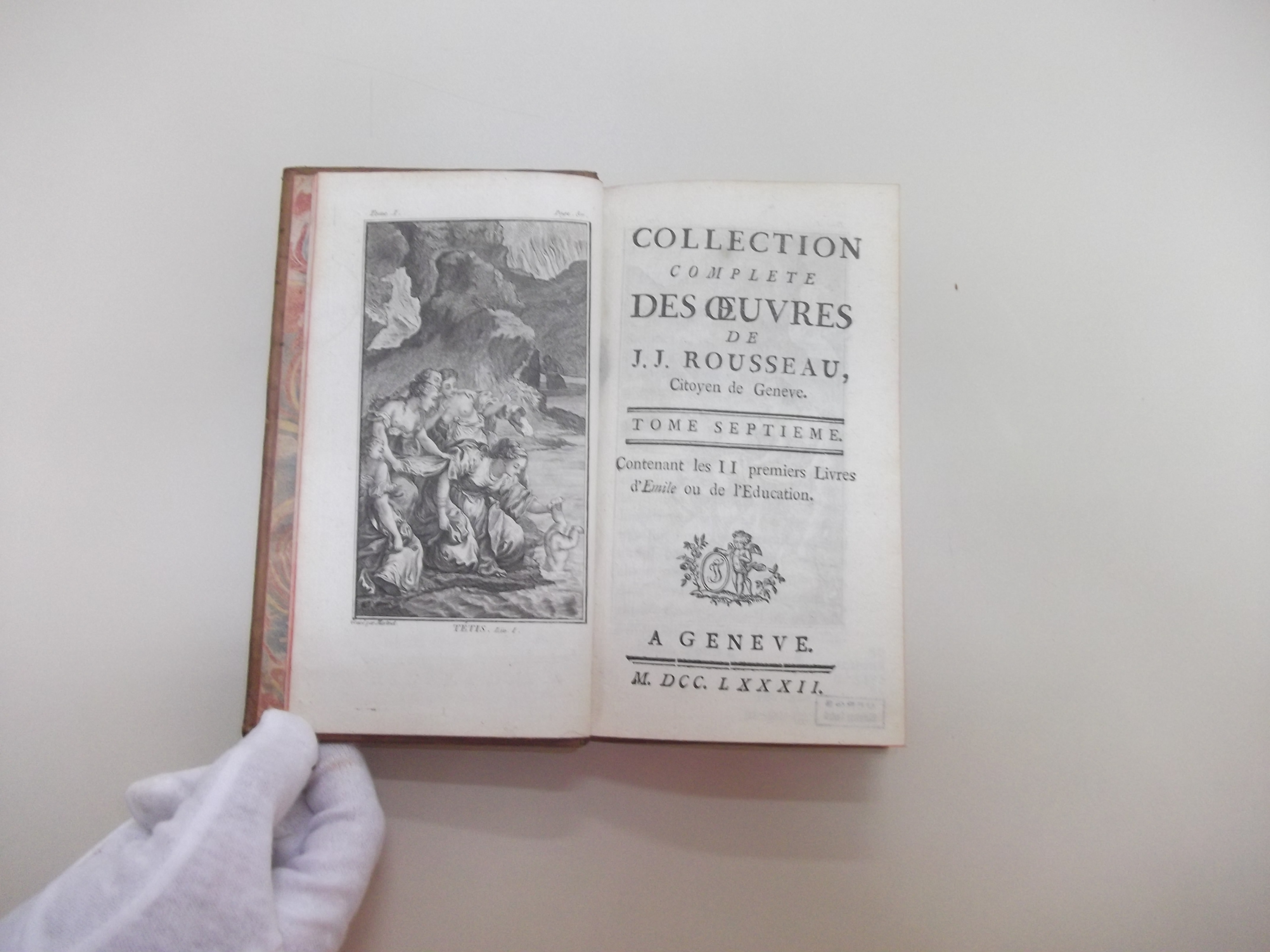 Rousseau, Jean Jacques, 1712-1778. Émile, ou, de l’Education. (Collection complete des oeuvres de J. J. Rousseau, v.7). A Geneve, [s.n.], 1782. Na Ilustração Aquiles é banhado no rio Estige por sua mãe, Tétis.